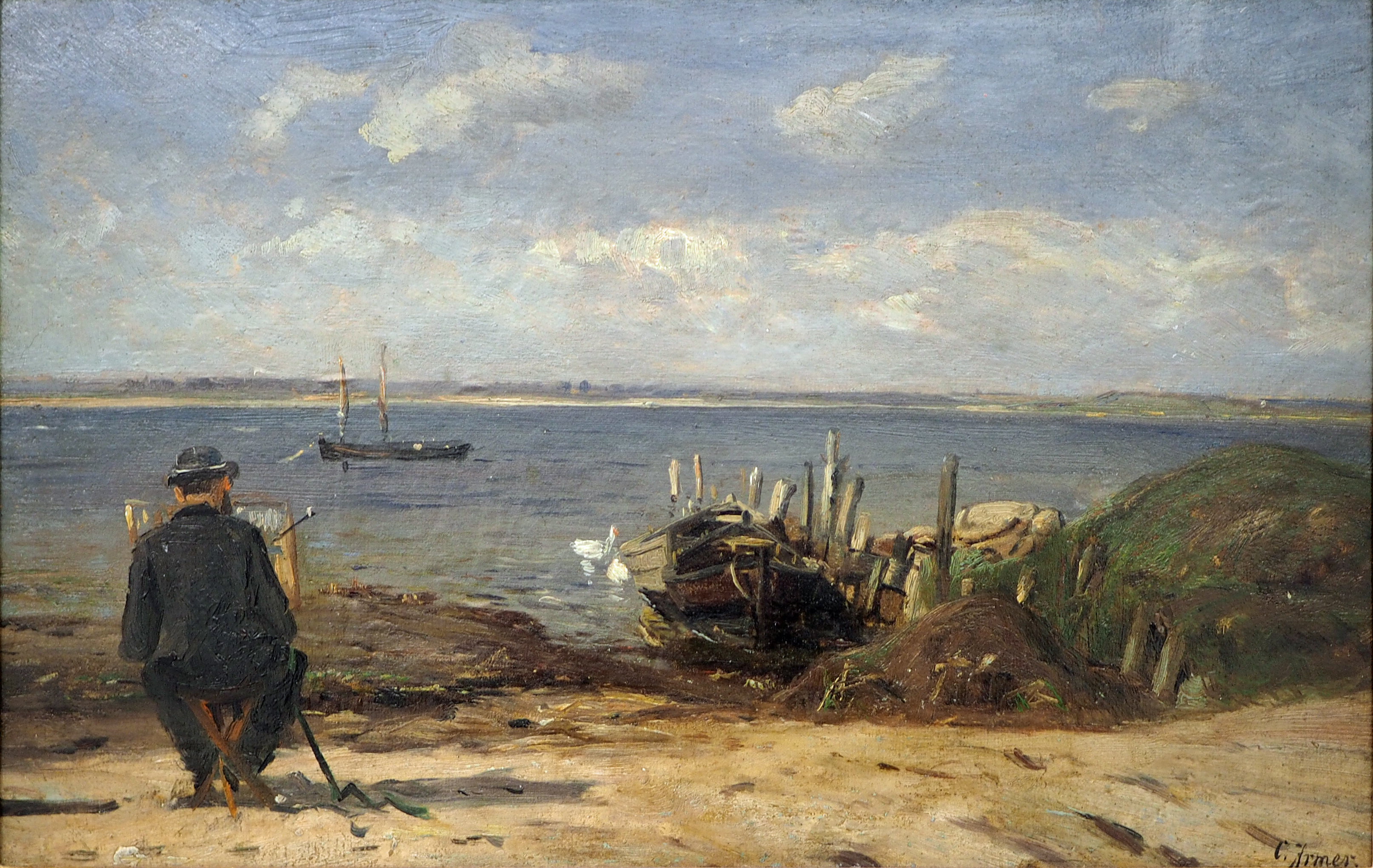 Das Bild zeigt wahrscheinlich Eugen Dücker an der Staffelei